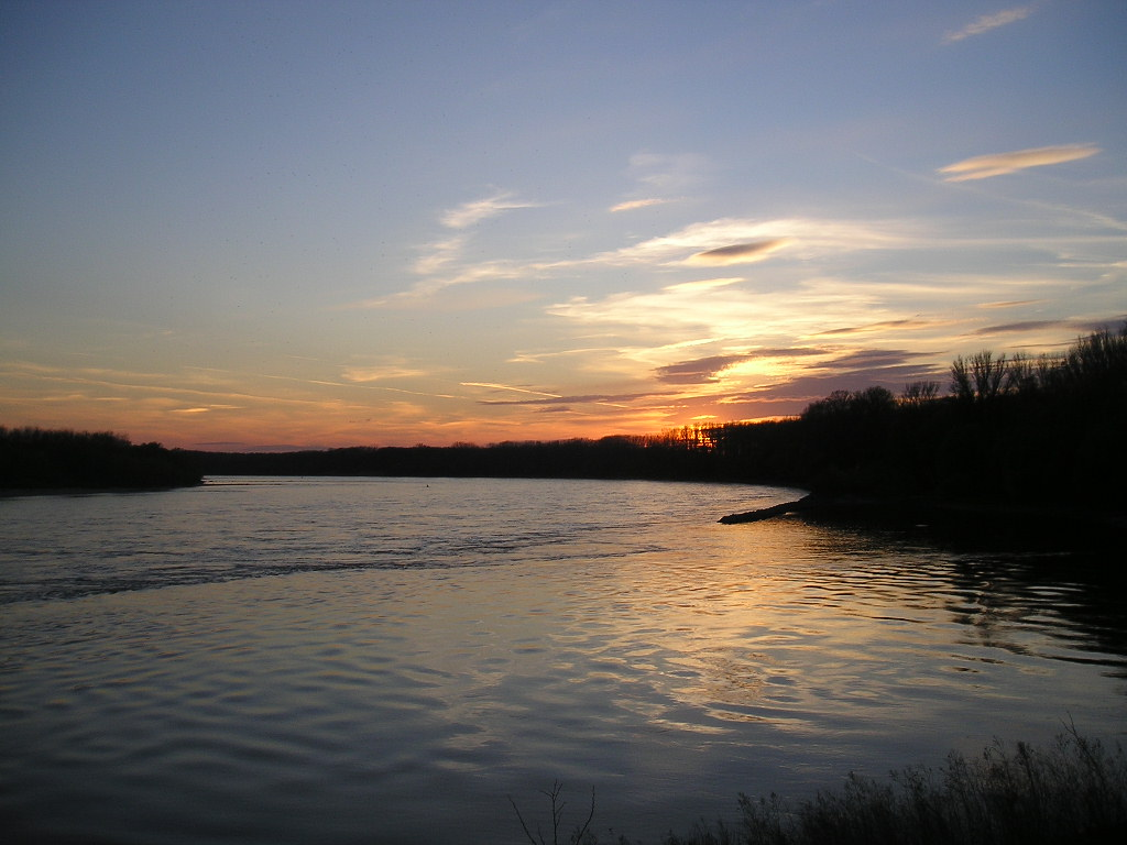 Danube Morava meeting